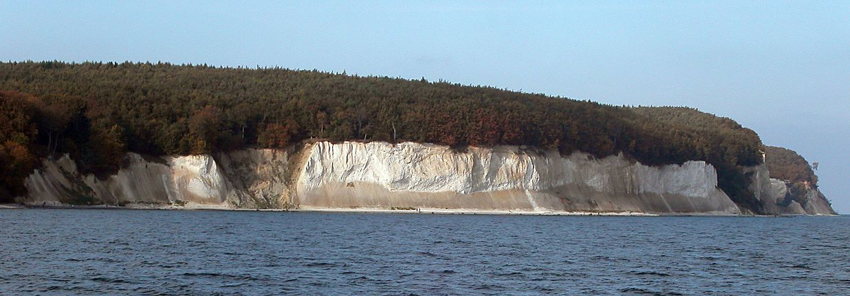 Stubbenkammer auf Rügen